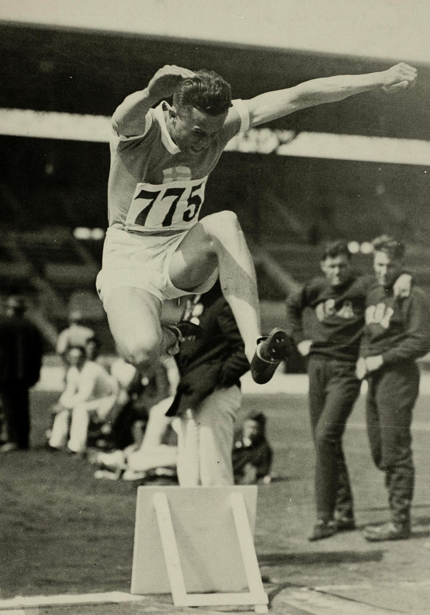 Sport. Sport, Olympische Spelen Amsterdam, 1928 : Akiless Järvinen in actie tijdens de tienkamp. Hij won zilver.